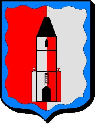 Escudo partido: 1º de gules y 2º de plata. Sobre el todo, una torre partida de plata y gules.